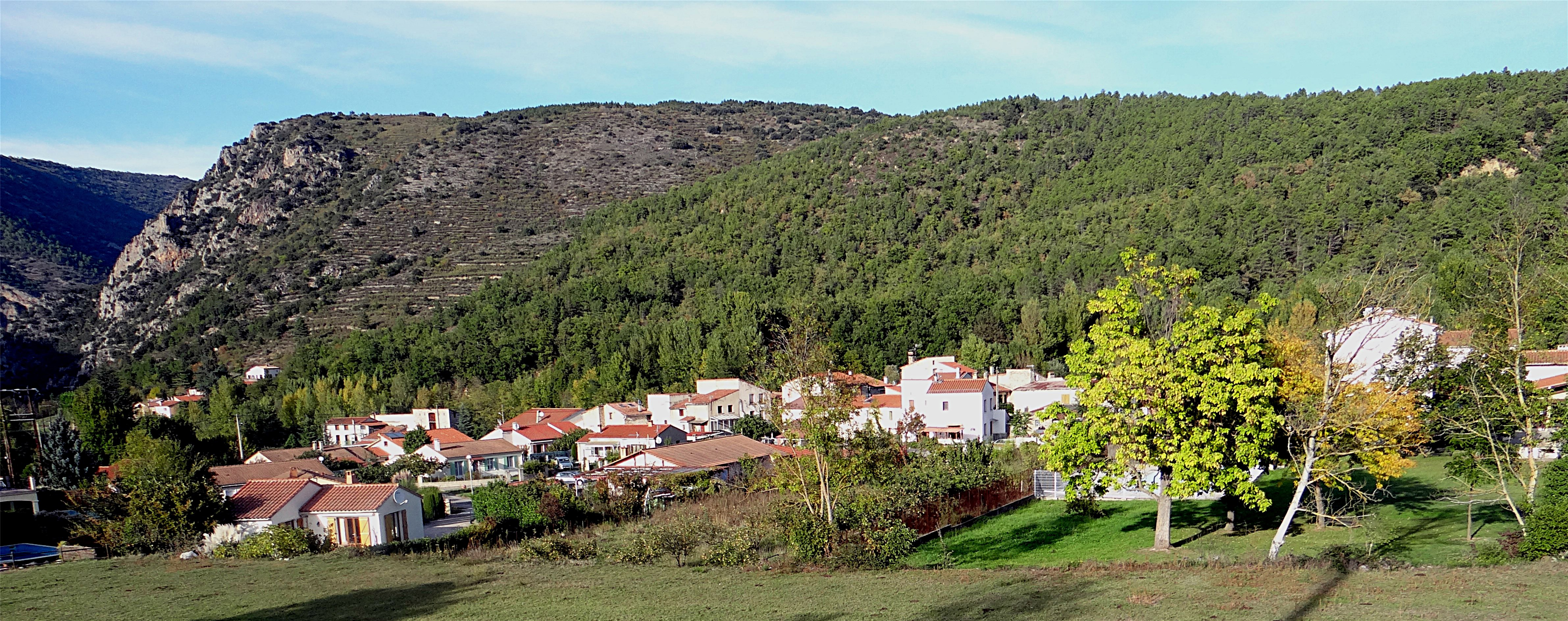 Fuilla de Baix, Fuilla, Pyrénées-Orientales, France.